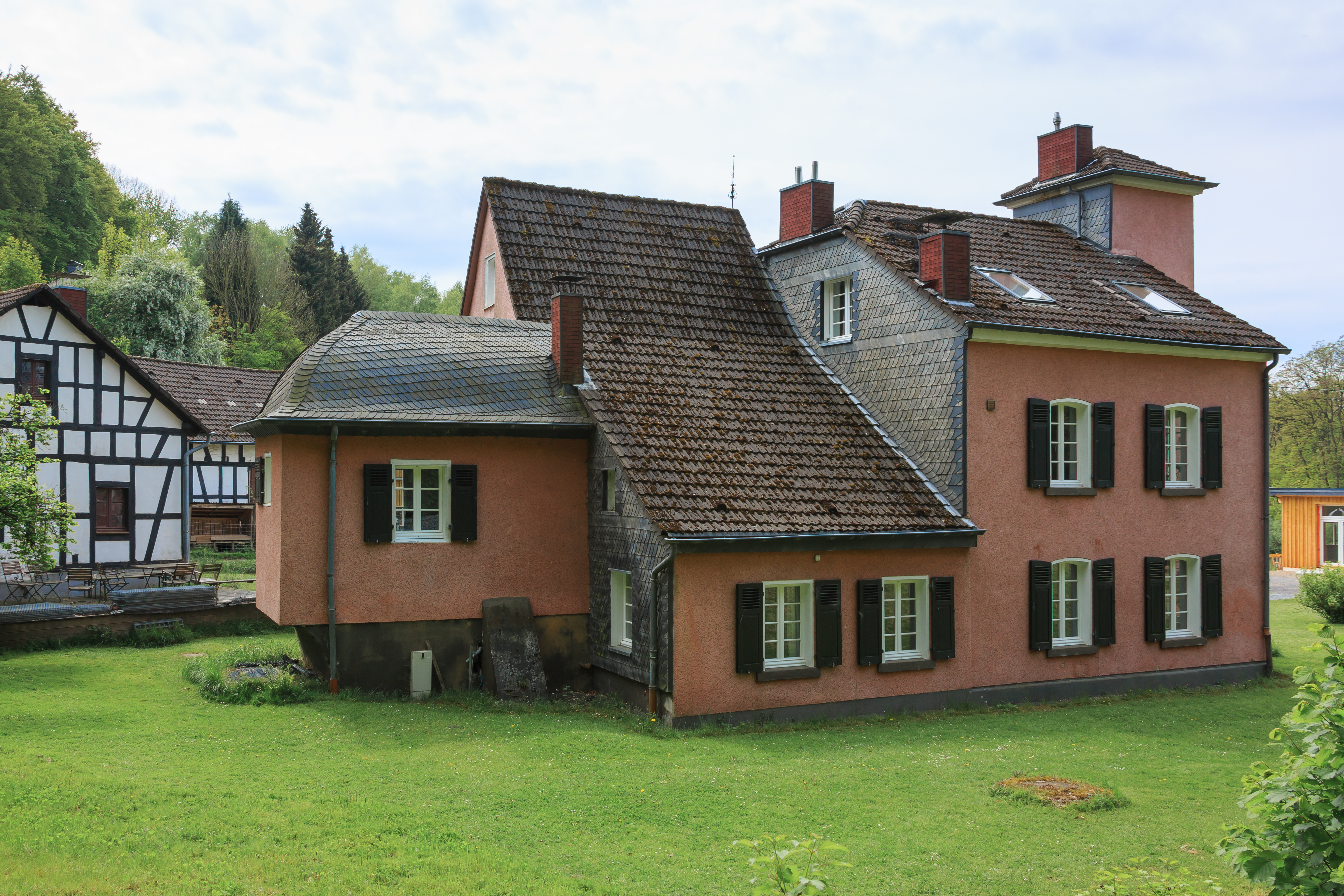 Rösrath, Deutschland: Haus Stade, denkmalgeschütztes Bauwerk Nummer 7, Lüghauser Strasse 16